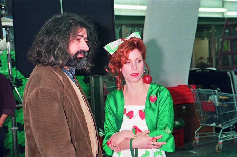 חיים בוזגלו מביים את אורנה בנאי